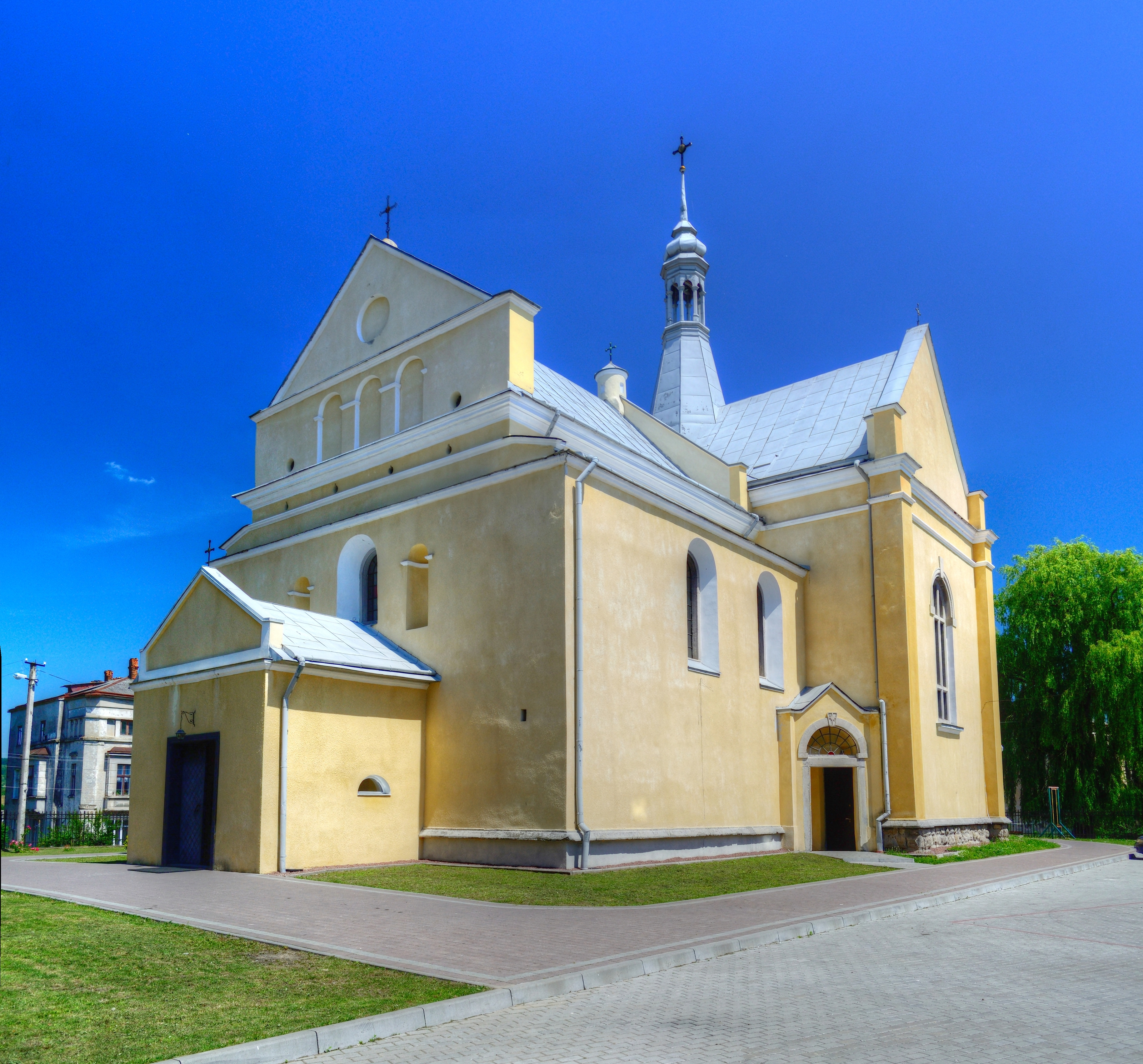 Костел в місті Бібрка